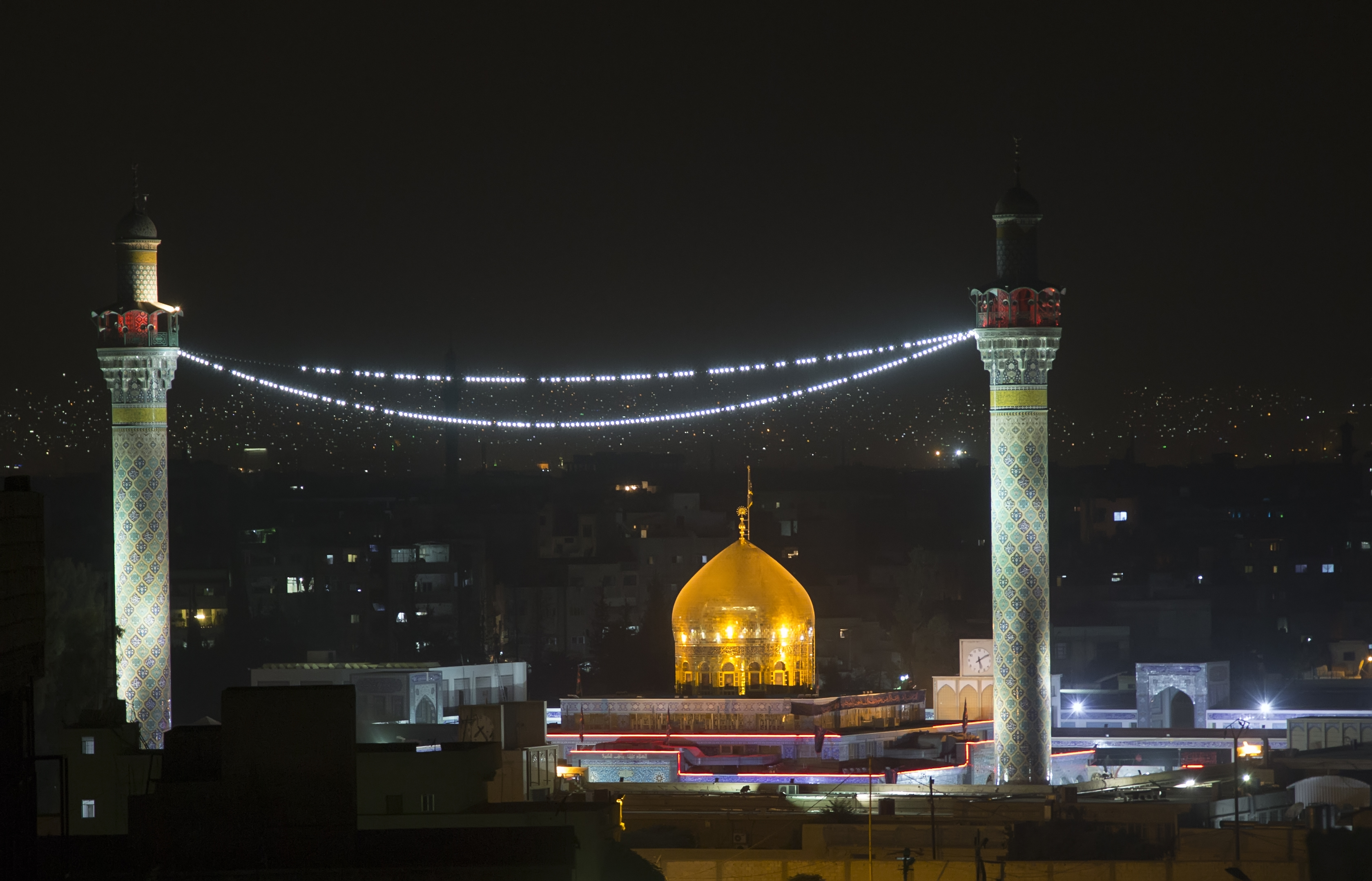 Sayyidah Zaynab Mosque in Damascus, Syria